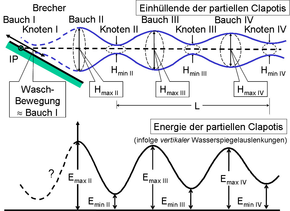 Das Bild zeigt schematisch die Zuordnung der Grenzlagen von Wasserspiegelauslenkungen zu der potentiellen Energie partiell reflektierter Wellen seewärts einer steilen Uferböschung. Extrapolierte Daten sind im Bereich des Wellenbrechens zwischen Schwingungsbauch II und Schwingungsknoten I gestrichelt dargestellt. Im oberen Teil des Bildes sind die Einhüllenden der über die Wellenperiode T wechselnden Wasserspiegellagen dargestellt - mit Wellenhöhen und Wellentälern, die (im Gegensatz zur perfekten Clapotis) in ihrer Aufeinanderfolge den Eindruck einer fortschreitenden Welle mit wechselnder Wellenhöhe vermitteln. Der untere Teil des Bildes zeigt schematisch etwa die den Schwingungsbäuchen und Schwingungsknoten zuzuordnende Wellenenergie. Aus der Tatsache, dass die Energiemaxima mit der Entfernung von der Böschung abnehmen, während die Energieminima anwachsen, kann geschlossen werden, dass die Reflexionswirkungen seewärts abnehmen bis nur noch etwa die Kinematik der fortschreitenden Welle vorliegt. Da die Extremwerte der Wellenenergie bekannt sind, können Reflexionskoeffizienten auch aus den benachbarten Maxima und Minima berechnet werden: Im vorliegenden Fall einer steilen Uferböschung kann aus der Tatsache, dass ein imperfekter Knoten in der Nähe des Punktes IP auftritt, auf das Vorliegen eines (partiellen) Phasensprunges geschlossen werden.